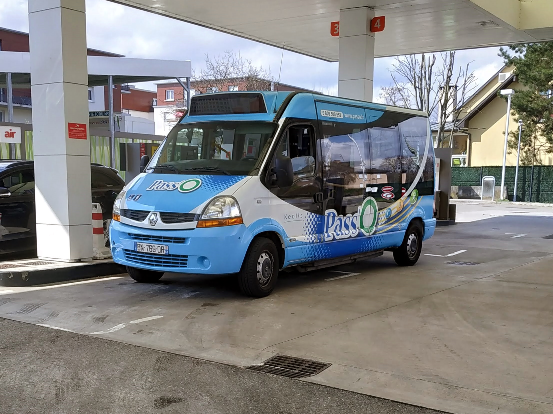 Renault Master du réseau de transport public Pass'O à Obernai